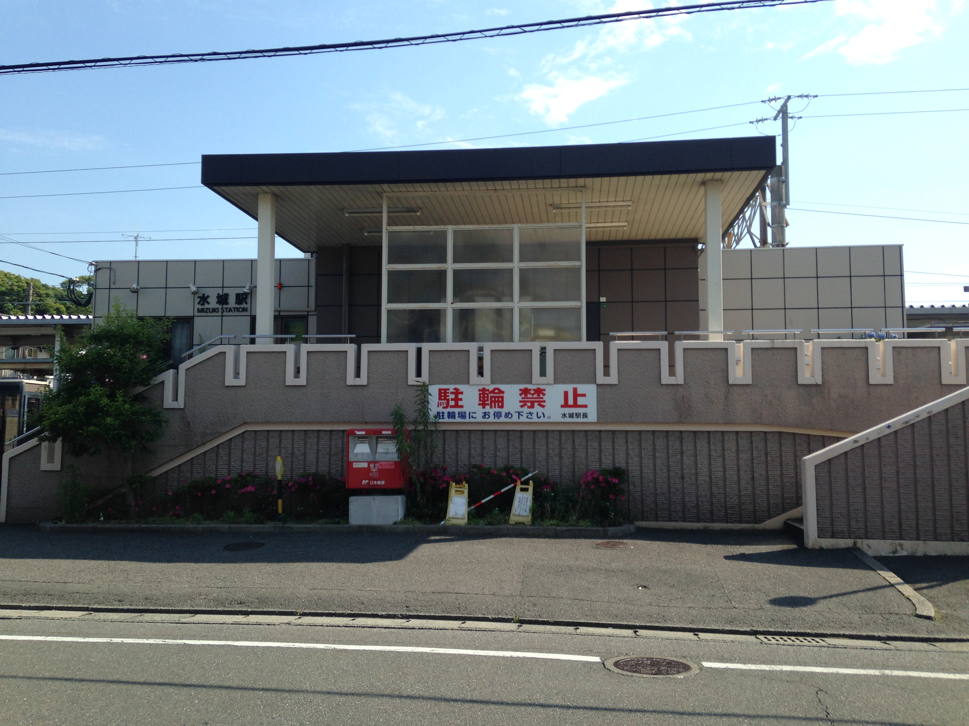 水城駅駅舎